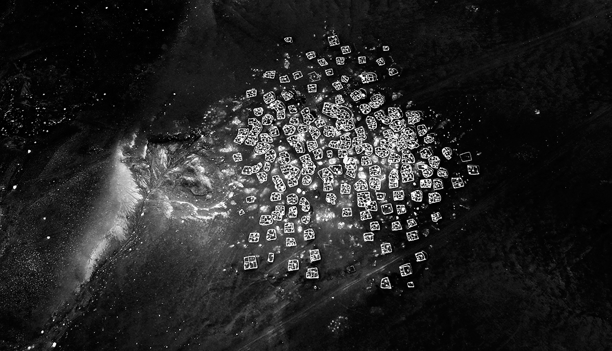 Les cavaliers du diable #60, 2013, tirage papier Photo Rag Hahnemühle, 42 x 73 cm The knights of the devil #60, 2013, Rag Paper print Hahnemühle, 17 x 25’’, 42 x 73 cm